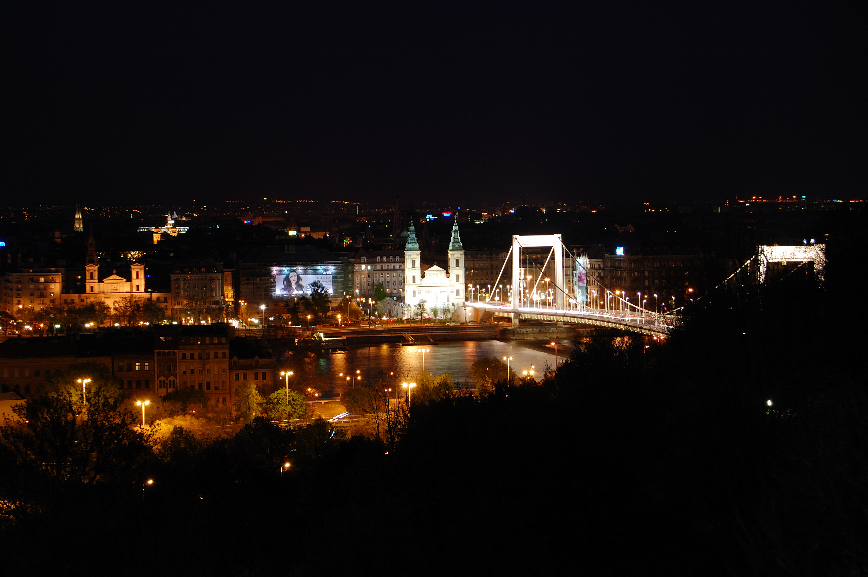 Budapest night panorama